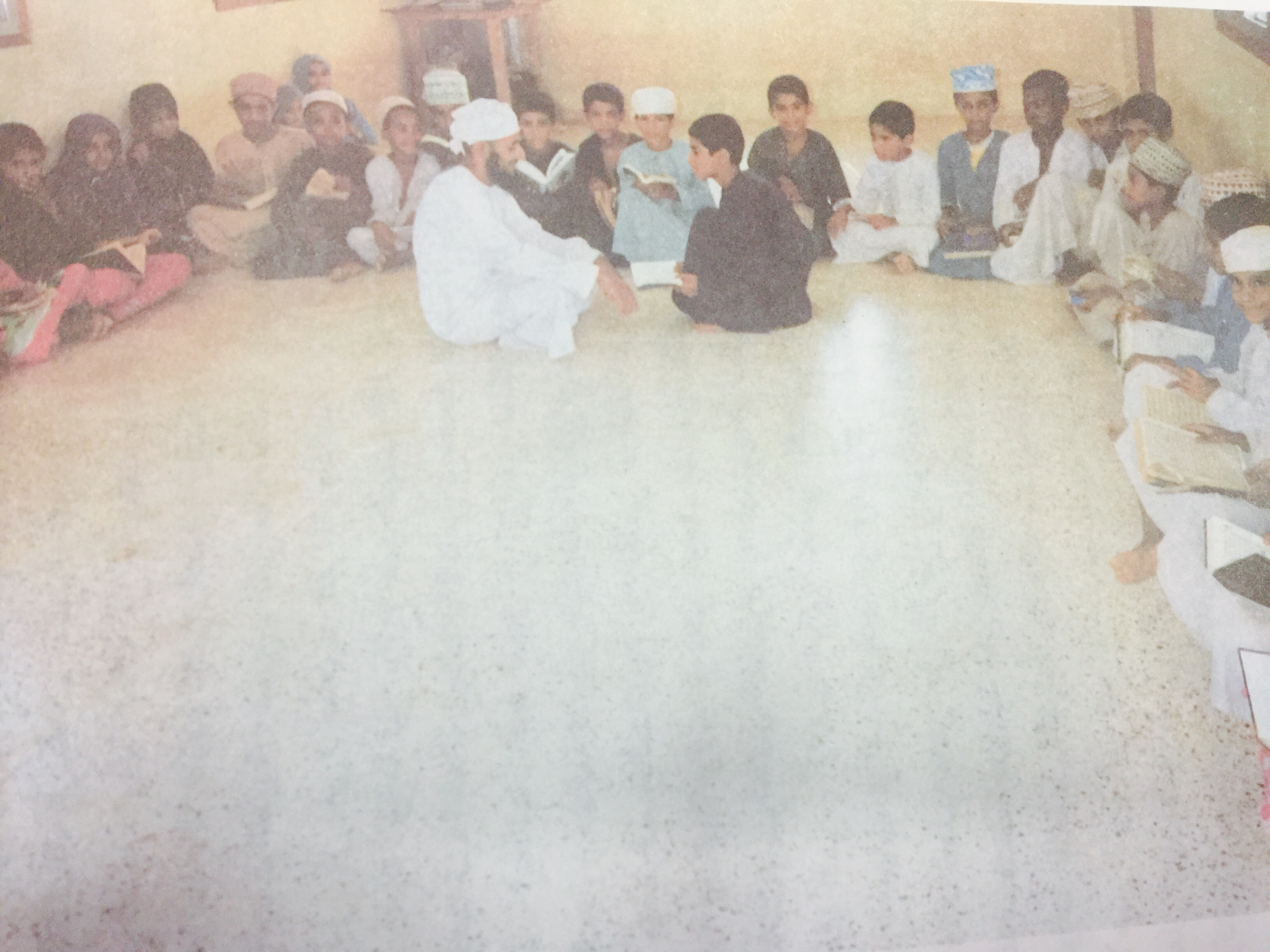 حلقة المعلم "الكتاتيب" وهو وسط مجموعة من تلميذاته وتلاميذه